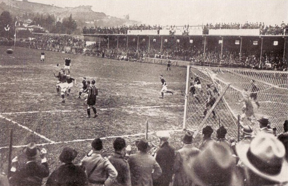 Il Campo "Angelo Badini" di Bologna, comunemente noto come lo Stadio Sterlino, 1927 circa.